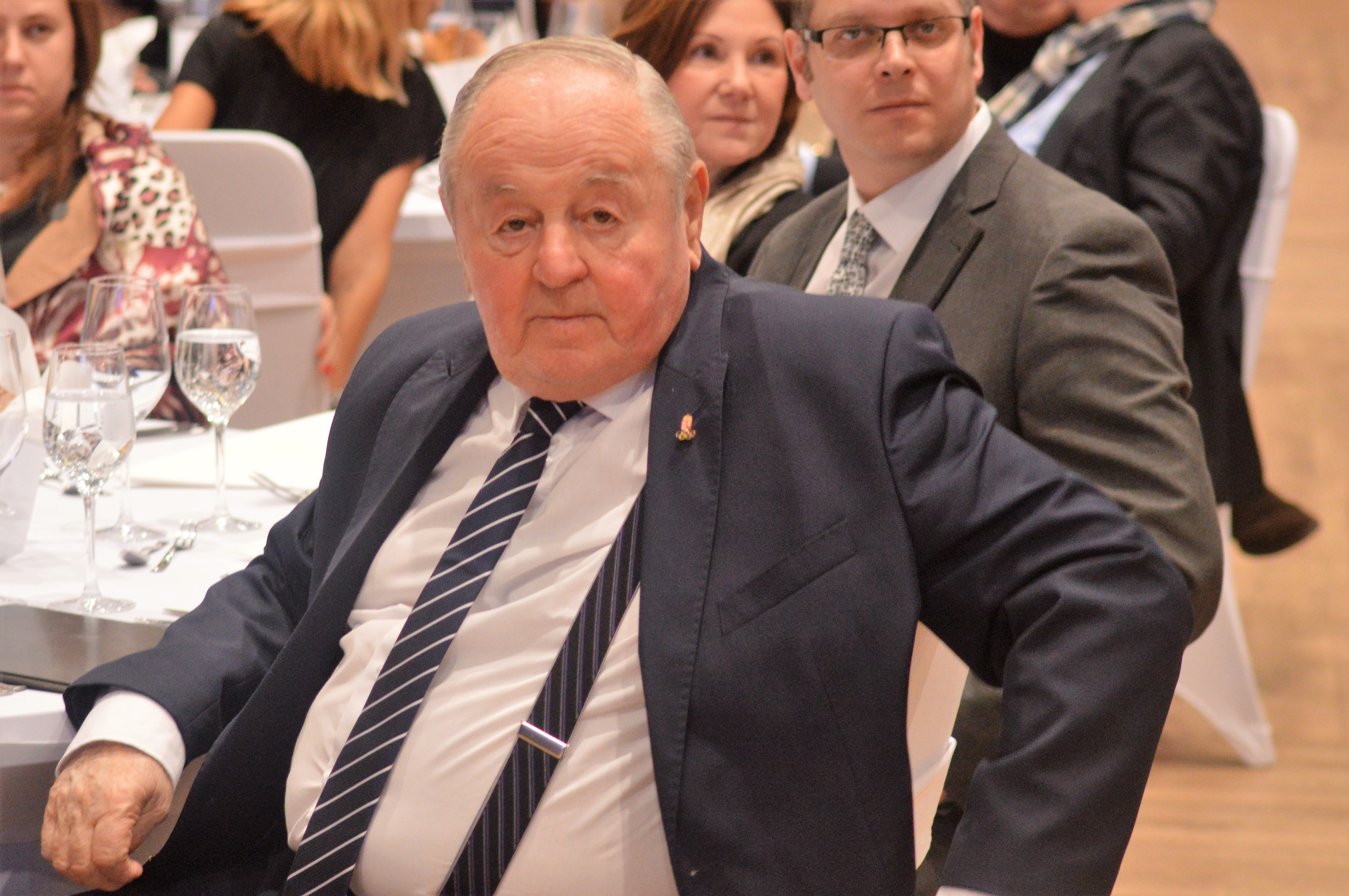 Dr. Kárpáti György olimpiai bajnok vízilabdázó